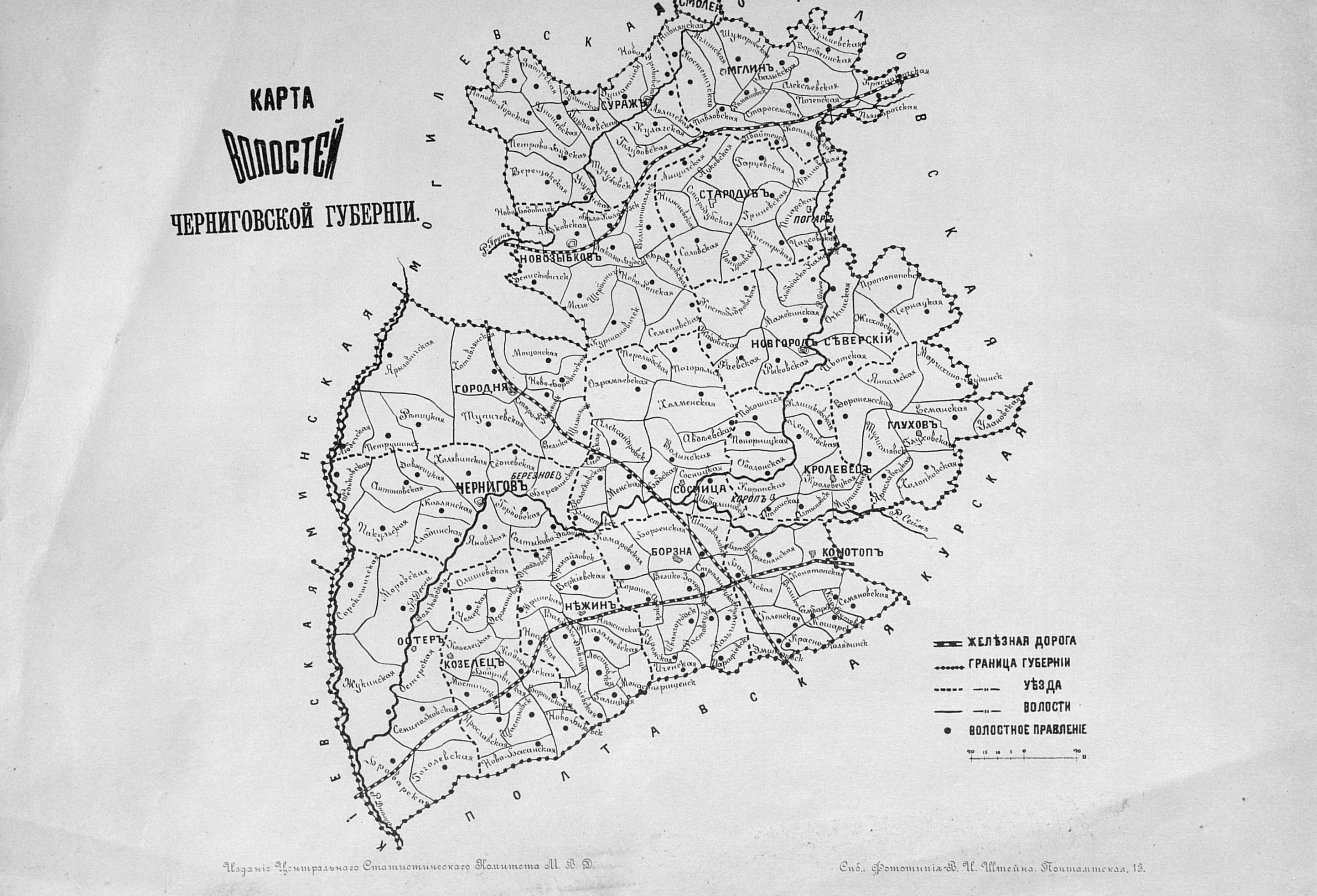 Карта волостей Черниговской губернии